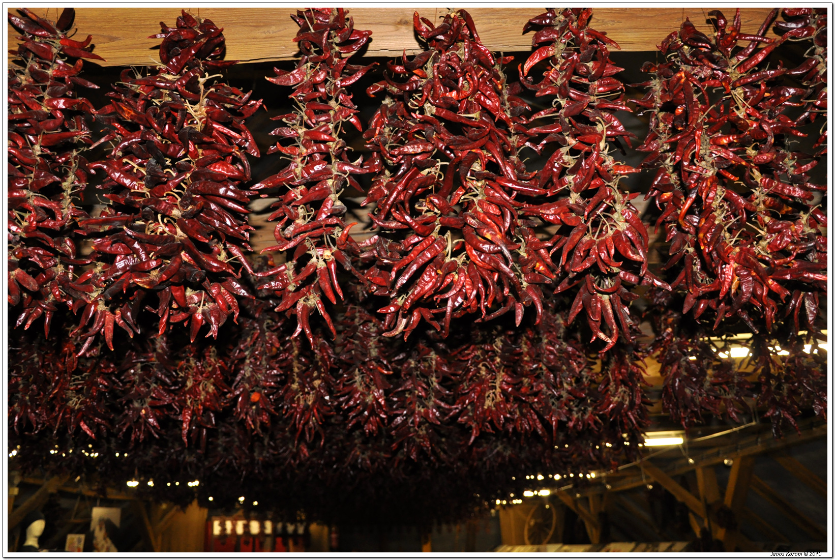 Paprika fűzérek a Paprika Múzeumban Kalocsán